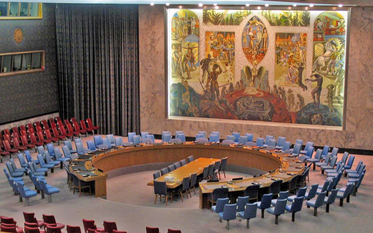 Sëtzungssall vum Sëcherheetsrot am UN-Haaptquartéier zu New York